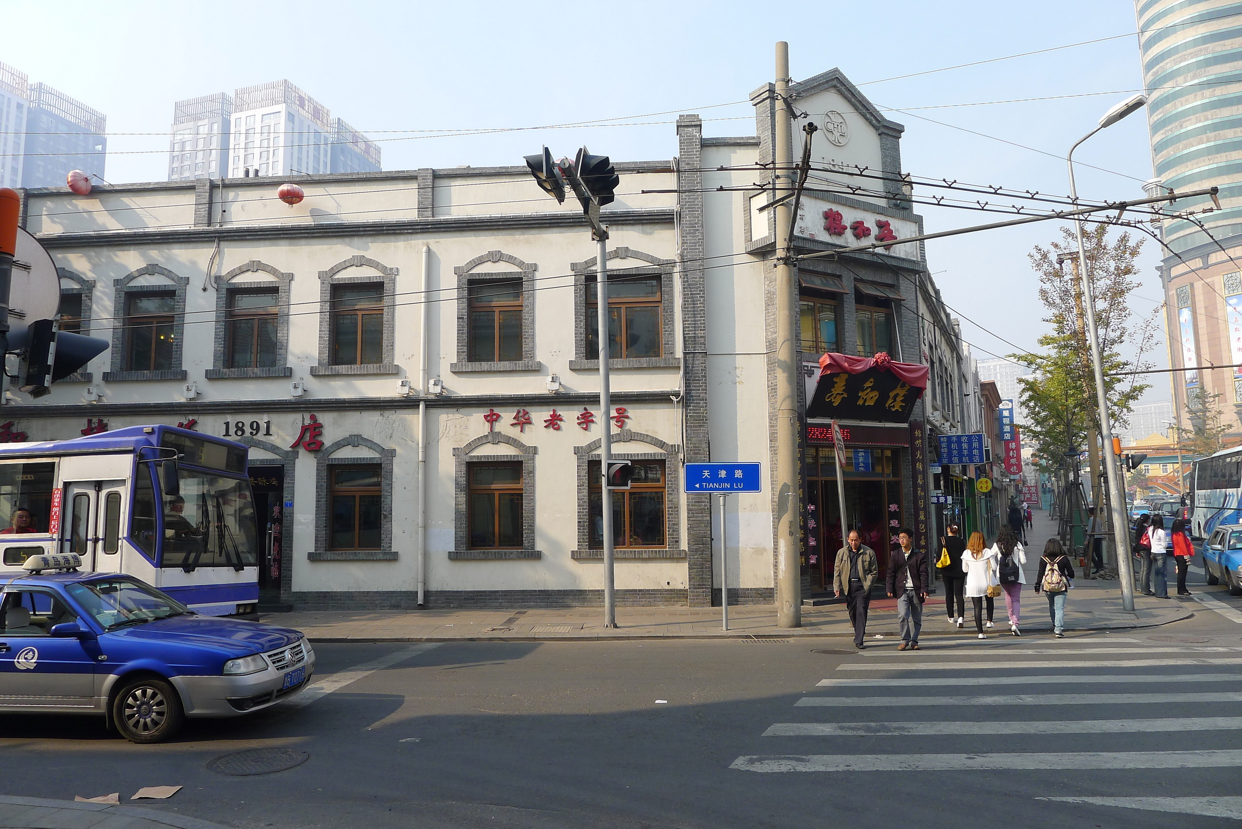 中华老字号青岛春和楼